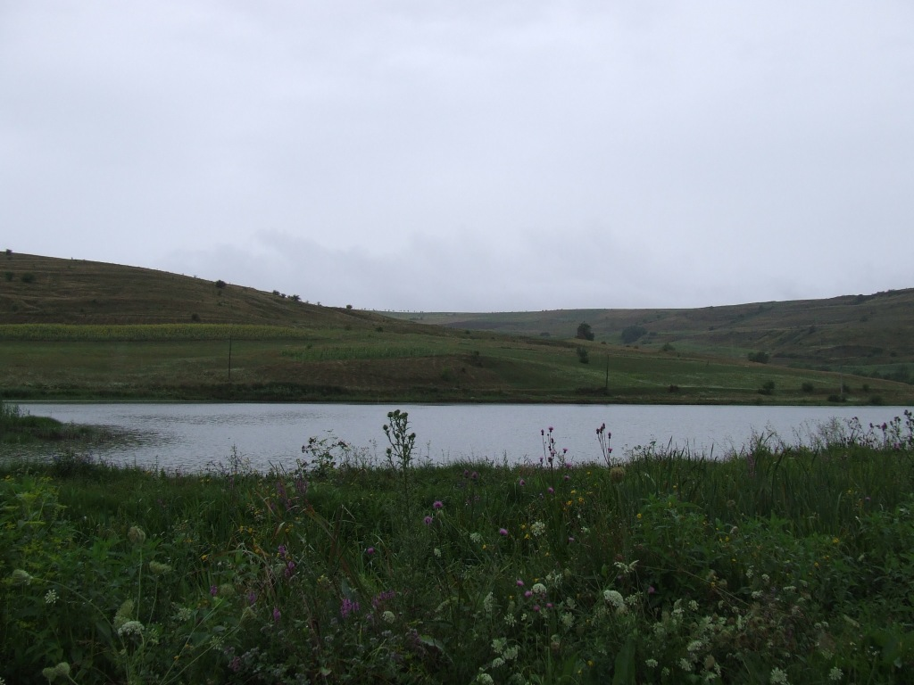 Lake in Manic village, Bistriţa-Năsăud County, Romania